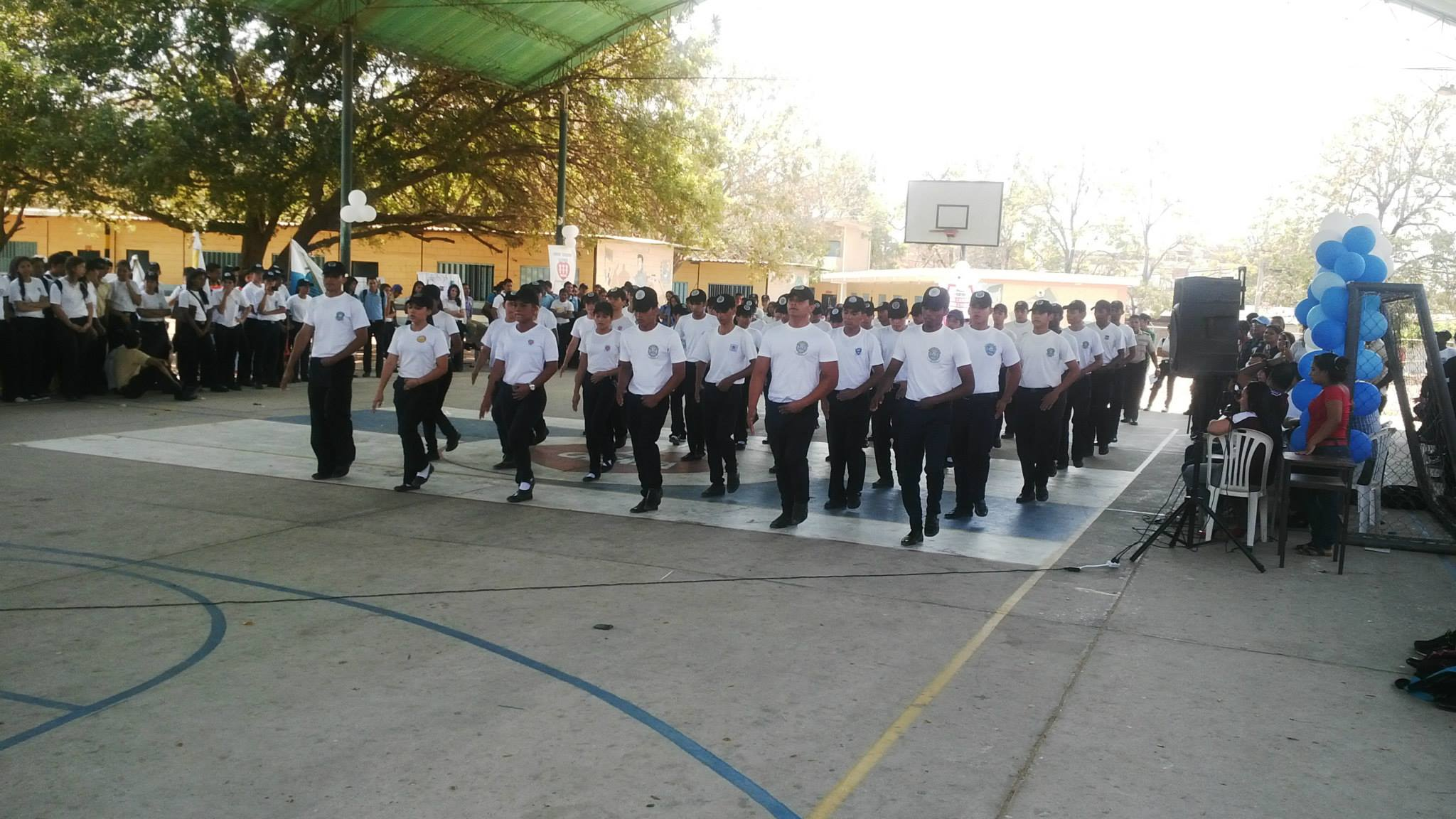 Estudiantes de varias instituciones en el 'Primer Encuentro de Instrucción Premilitar', del Municipio Escolar Maracaibo 9, en el estado Zulia, Venezuela